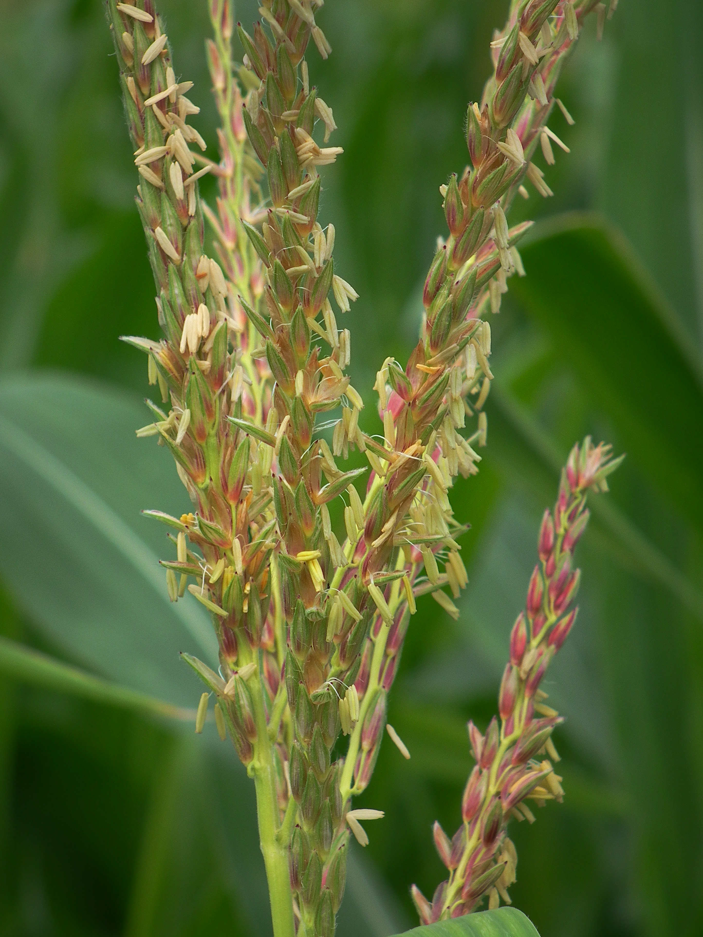 Blüte einer Maispflanze, fotografiert im nördlichen Baden-Württemberg (Deutschland)